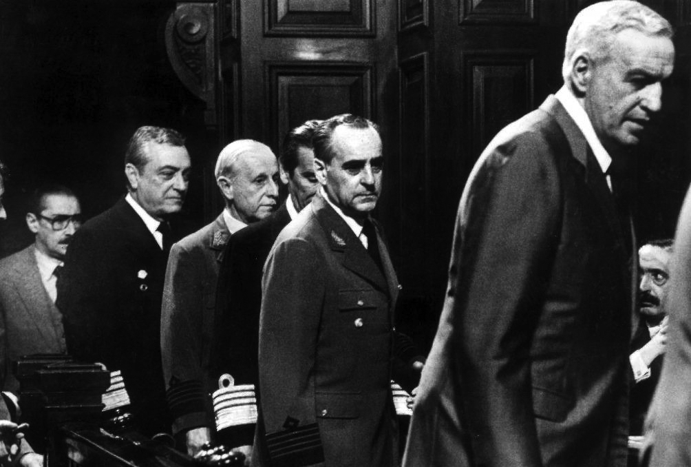 Juicio a las Juntas (22/05/1985). Integrantes de la Junta Militar ingresan a la sala de audiencias.